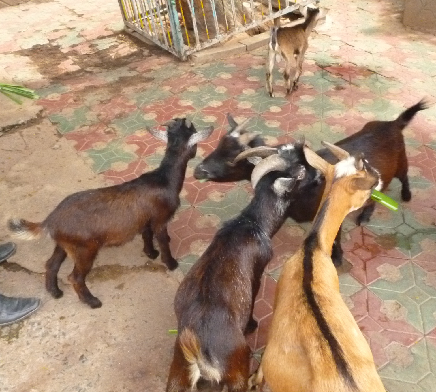 Hình chụp đàn dê cỏ ở Sở thú bằng máy ảnh cá nhân rồi up lên Wiki